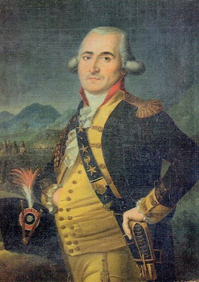 Portrait par François Malepart de Beaucourt (87 x 65 cm)